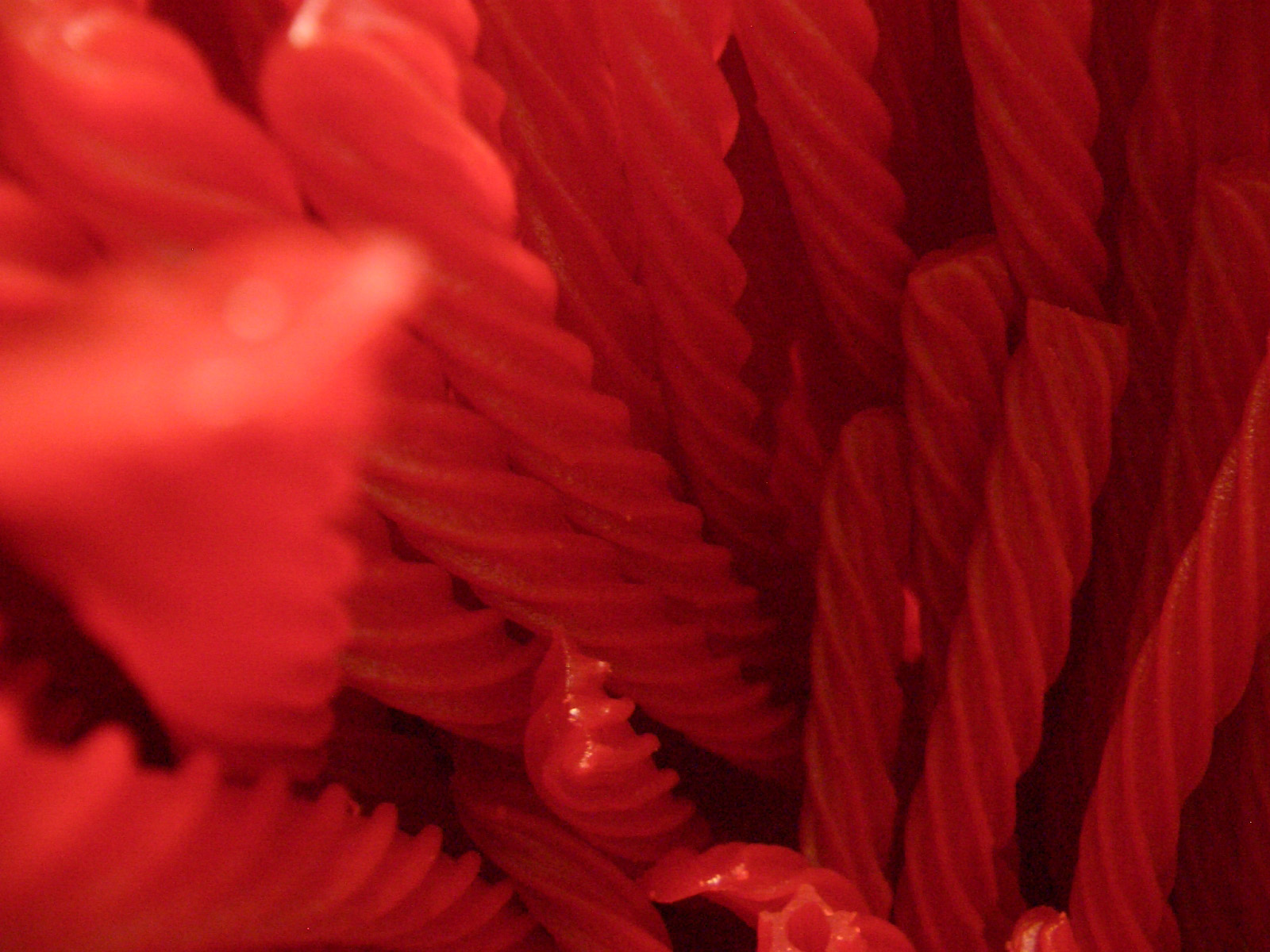 Red Vines